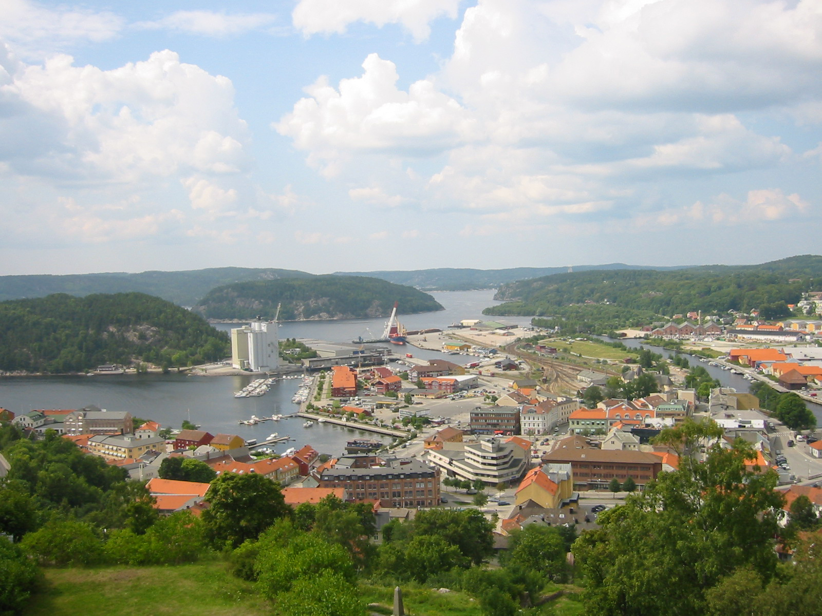 Halden fra Fredriksten Festning